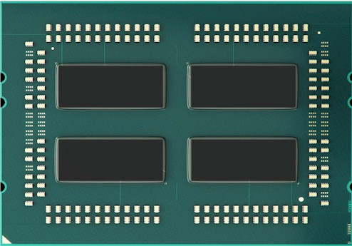 Процессор AMD EPYC без крышки.